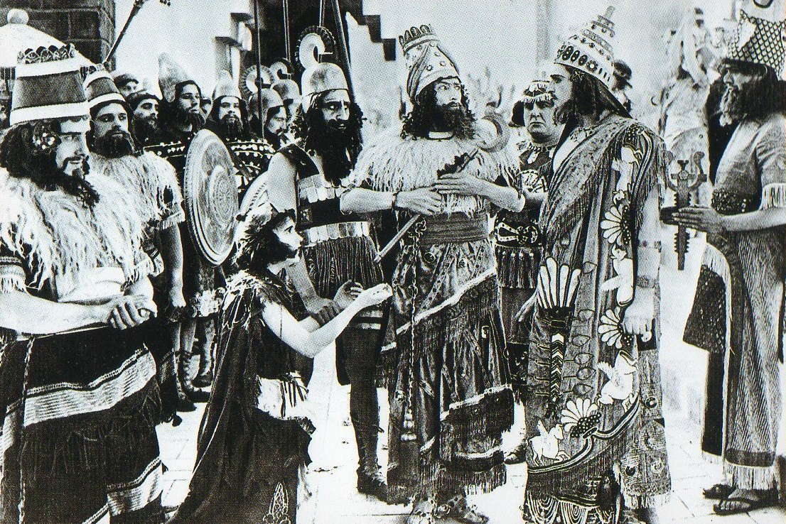 Fotograma de Intolerancia Constance Talmadge and Alfred Paget (Belshazzar)